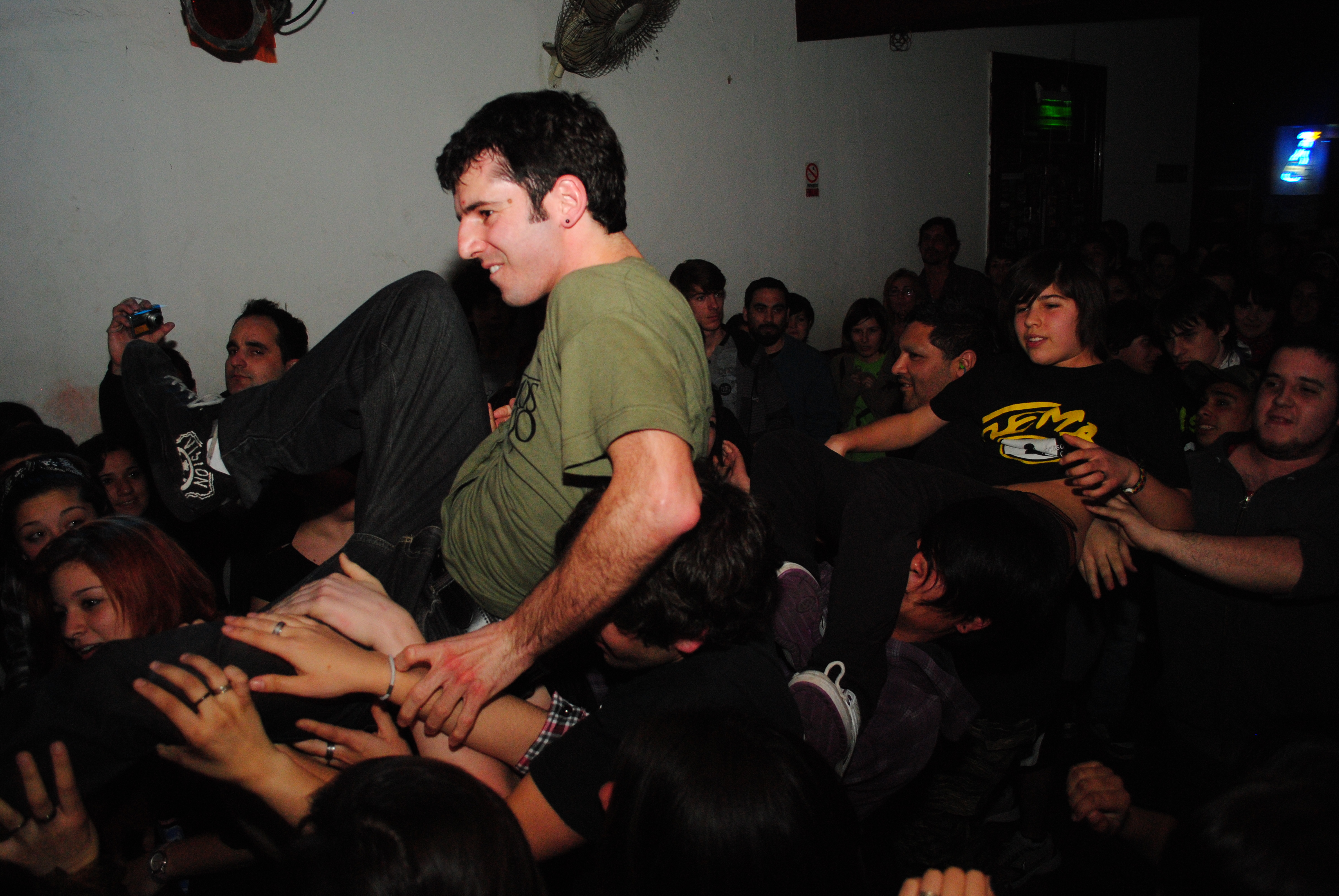 el Mosh